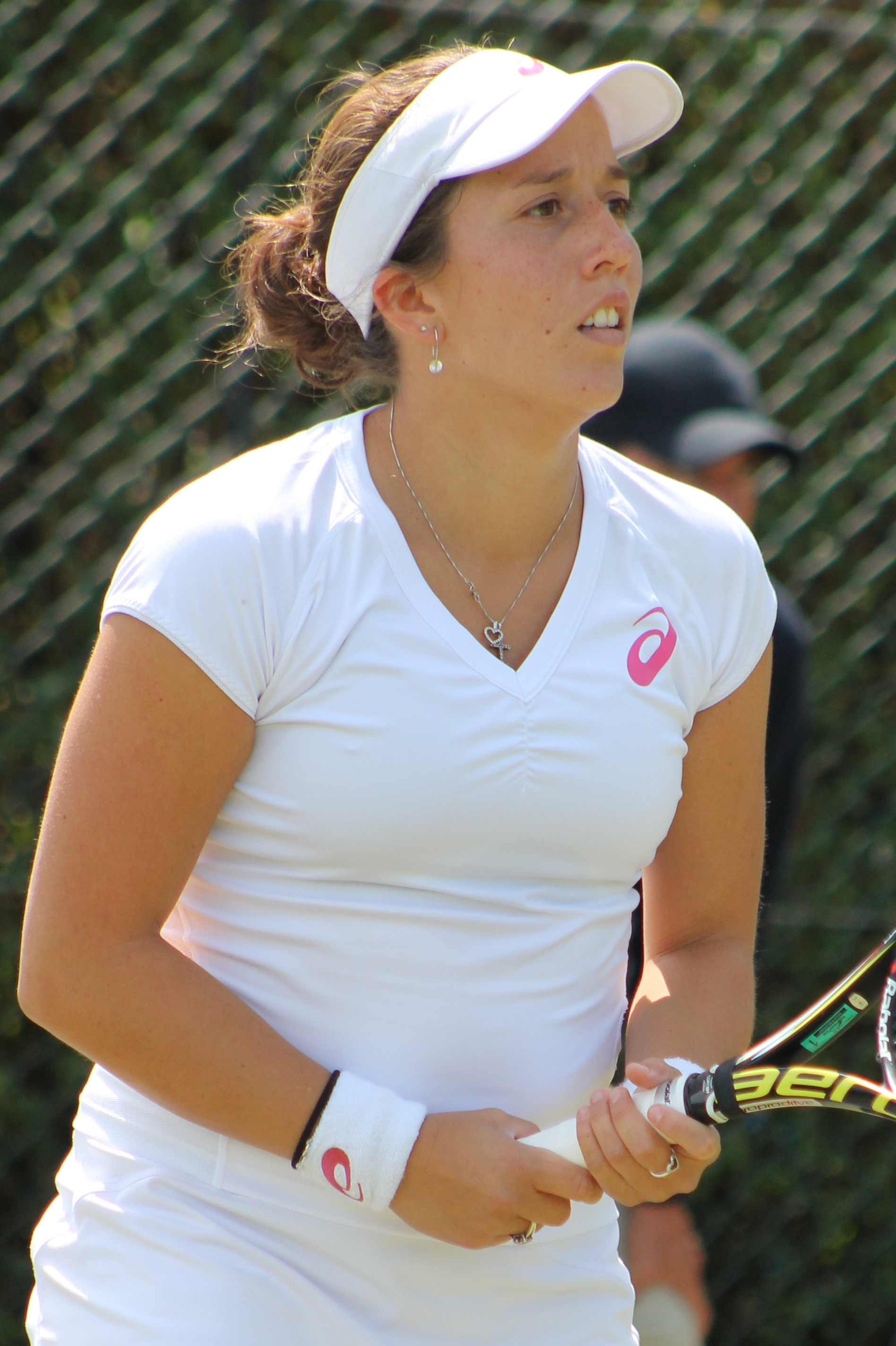 Falconi WMQ14 (6)